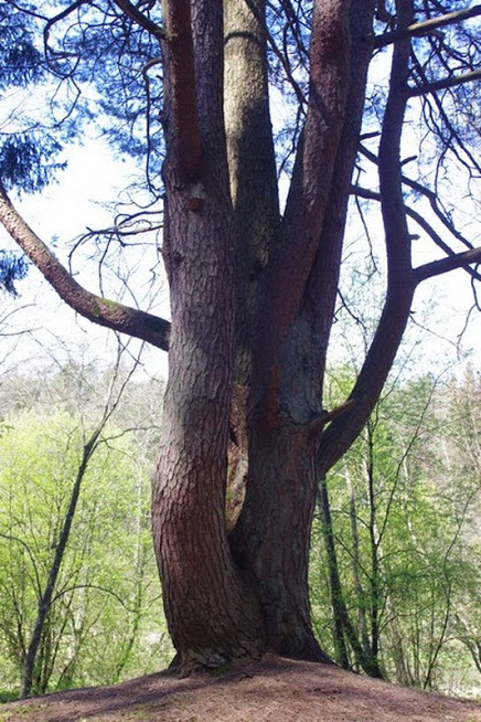 Pušis Anykščių šilelio rekreaciniame take